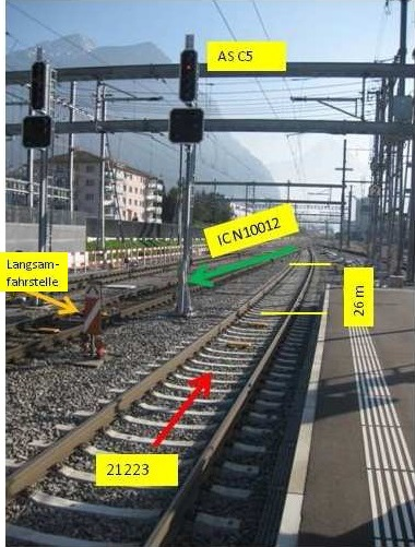 Am Samstag, 15. Oktober 2011 ist im Bahnhof Altdorf der S-Bahn Zug 21223 bei geschlossenem Ausfahrsignal C5 abgefahren. Bei Vorbeifahrt am Halt zeigenden Signal wurde der Zug durch die Zugsicherung gestoppt. Der Zug kam ca. 42 m nach dem Signal zum Stillstand. Er verletzte das Profil des Gleises 4, wo eine Durchfahrt für den IC Zug 10012 eingestellt war.